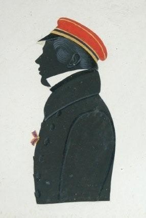 Scherenschnitt des stud. jur. Carl Otto Dammers (1811-1860) aus Walsrode in Couleur des Corps Hannovera Göttingen. Dammers war später Mitglied der Frankfurter Nationalversammlung und des Nachparlaments in Gotha.